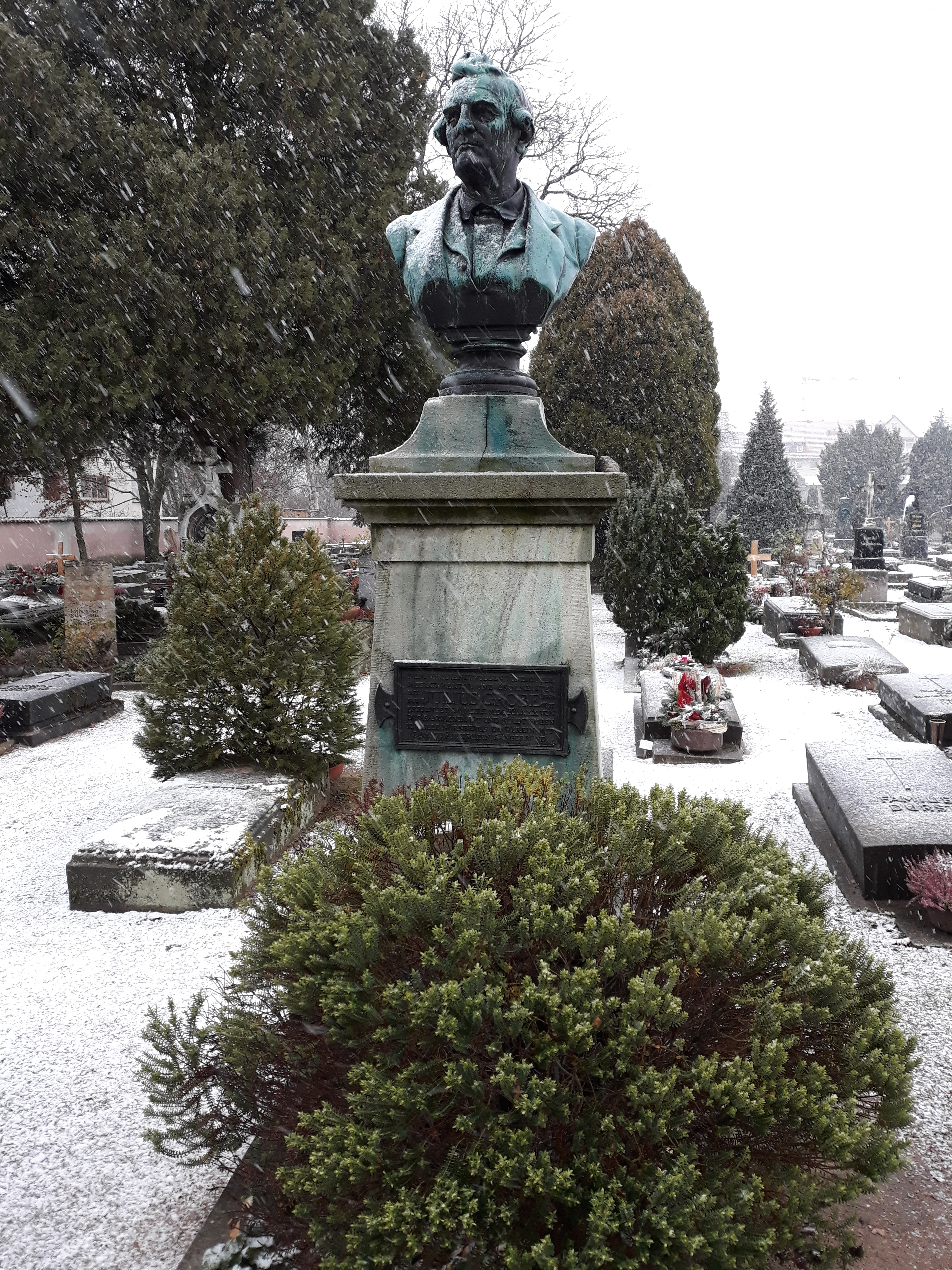 Das Grab des deutschen Musikers Julius Grobe auf dem Johannisfriedhof Nürnberg